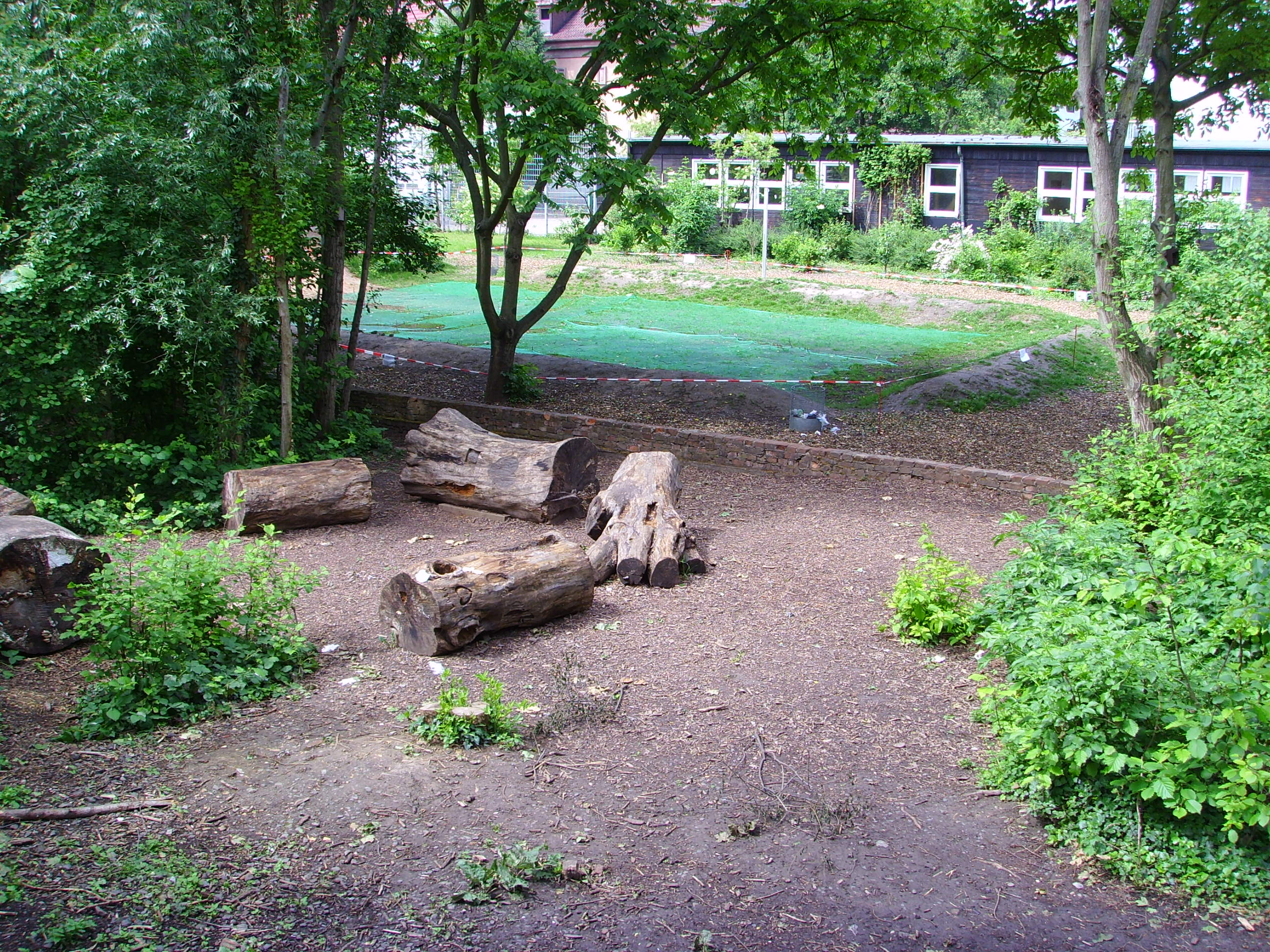 Ziehenschule in Frankfurt am Main, Schulpark, Teilansicht